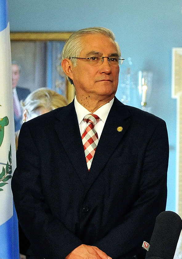 Haroldo Rodas